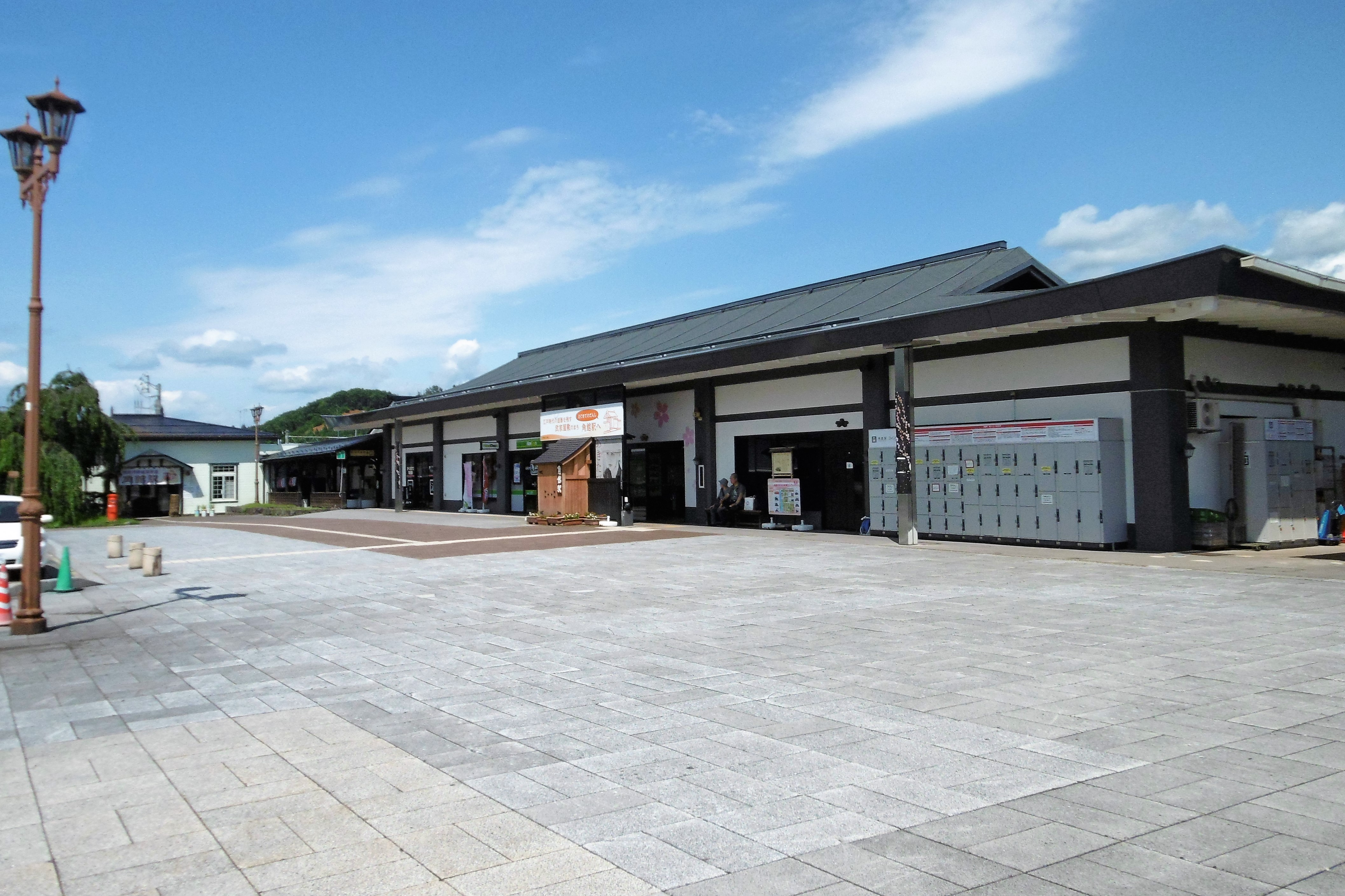 角館駅：仙北市角館町